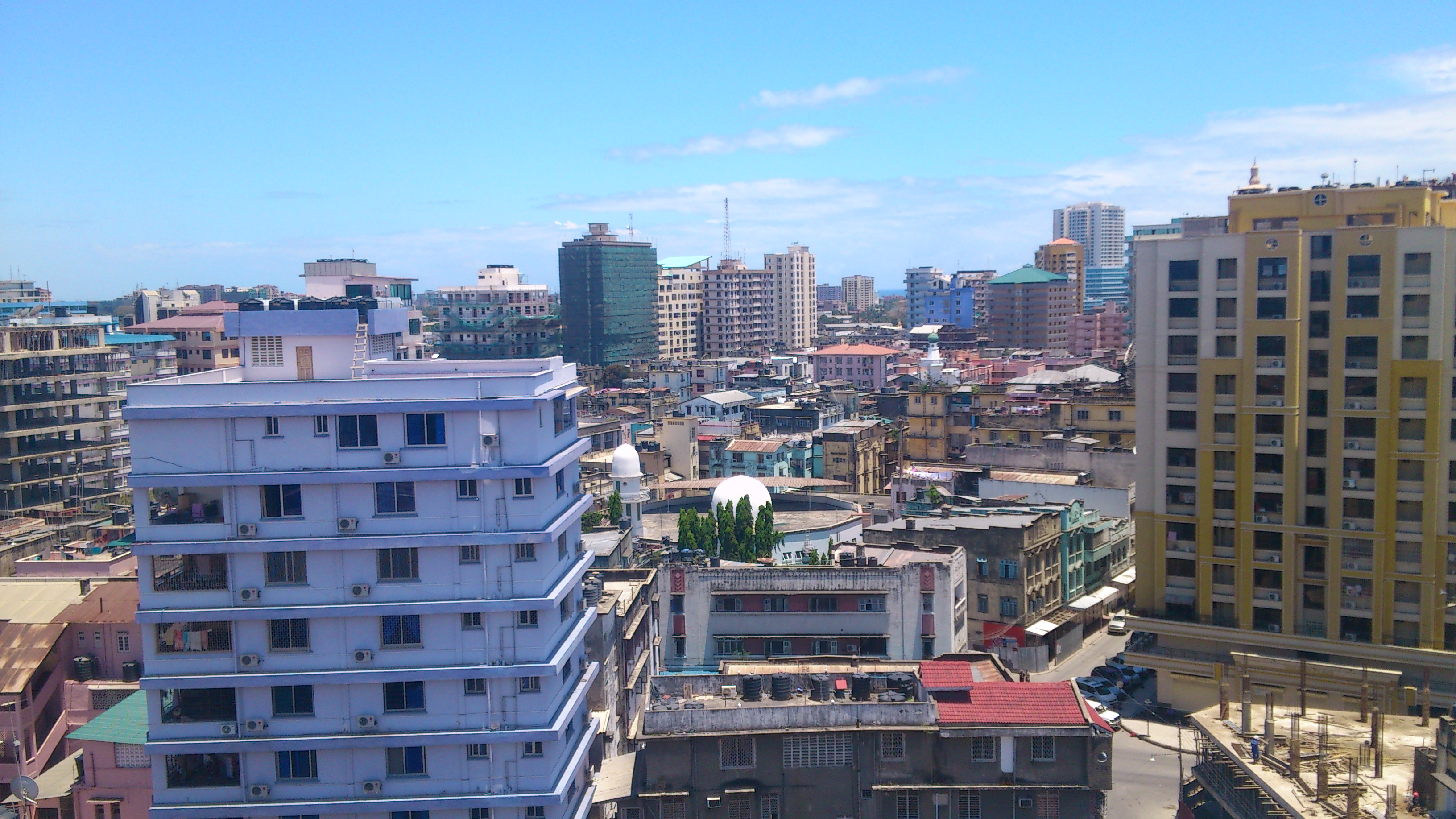 Dar es Salaam, Tanzania